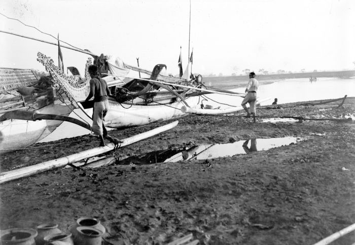 Repronegatief. Haven van Bangil met Madoerese prauwen, Oost-Java